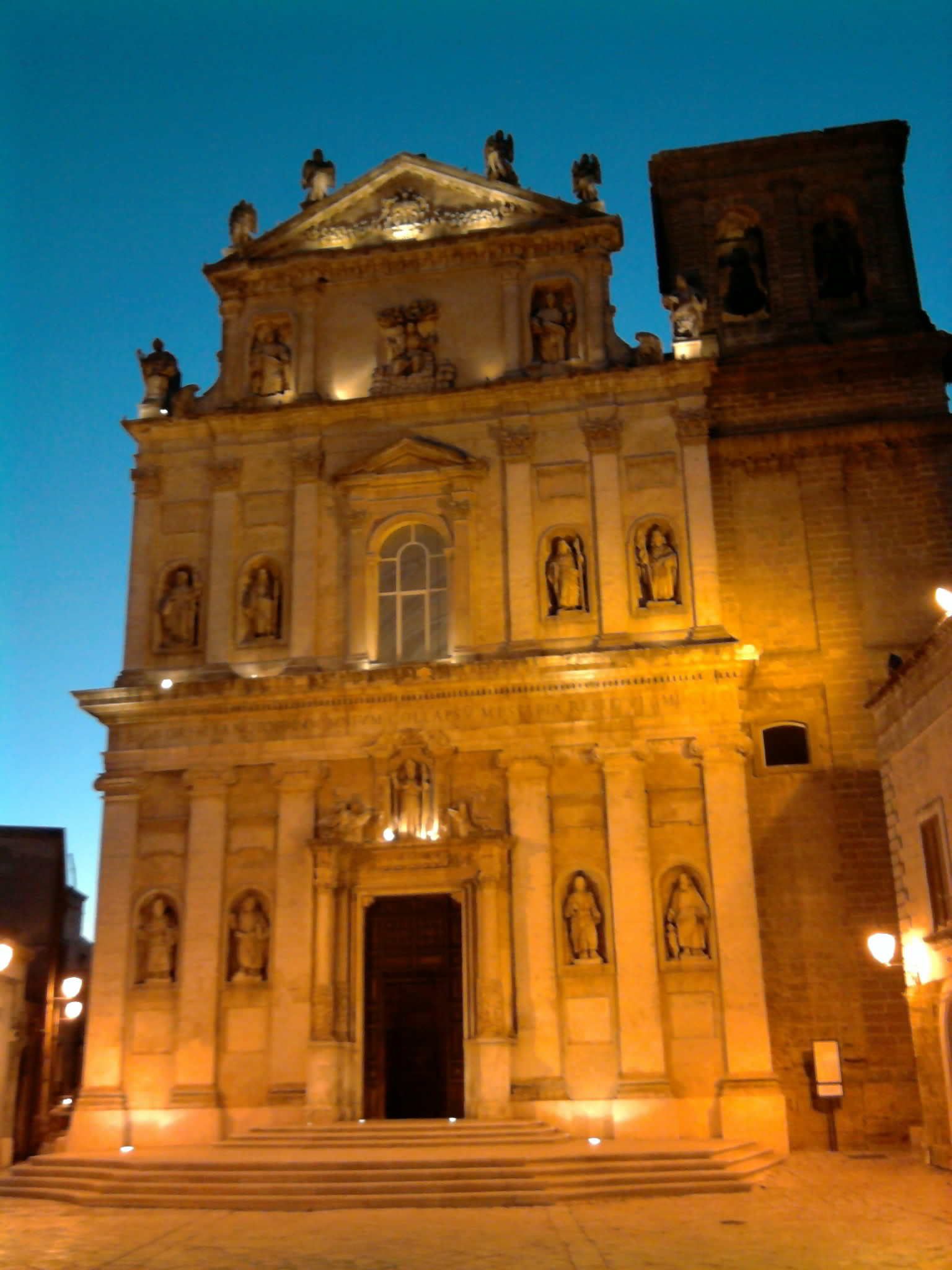 Chiesa Madre - centro storico